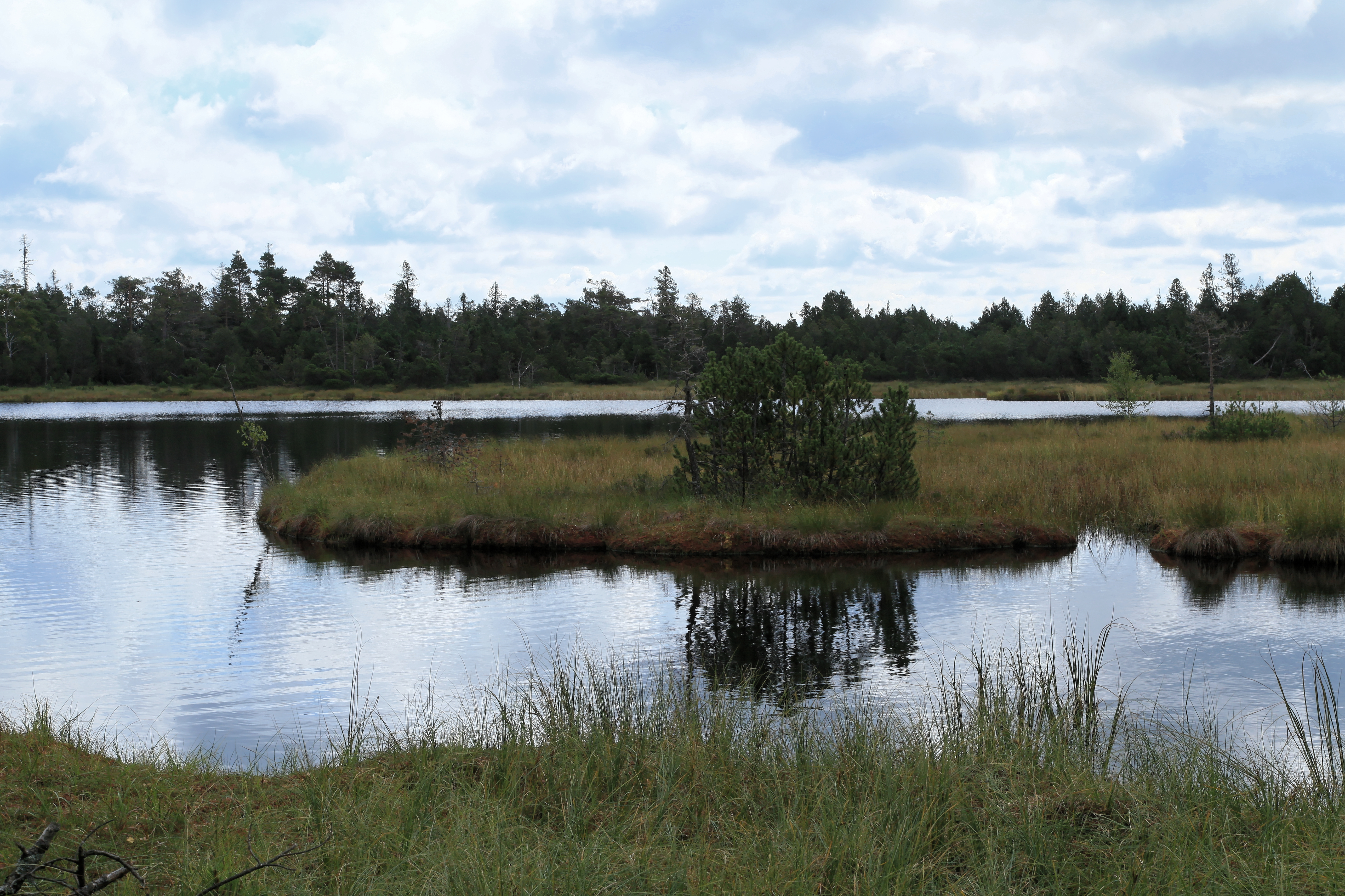 Wildsee im Wildseemoor in Kaltenbronn, Gernsbach